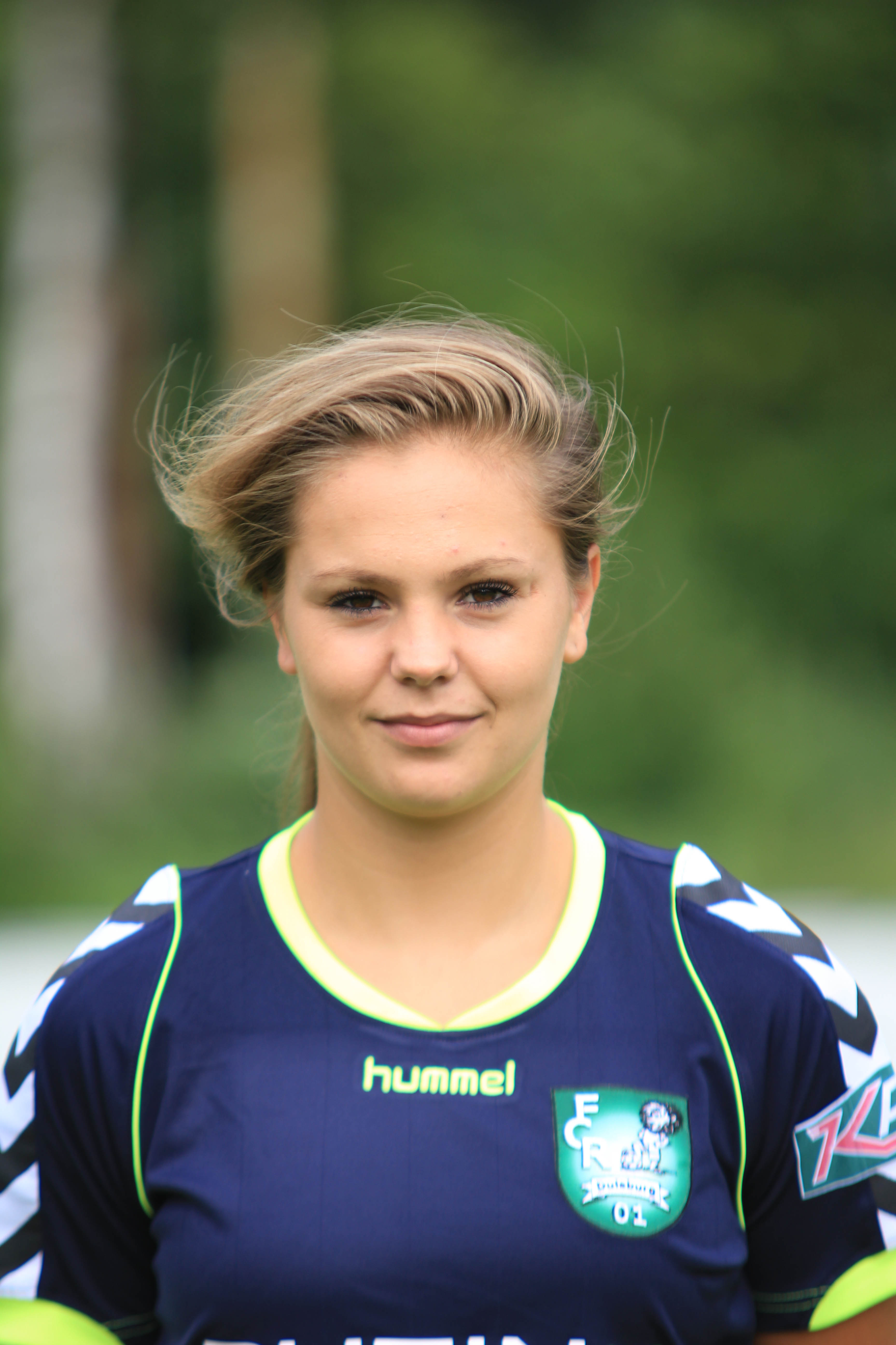 Lieke Martens, FCR 2001 Duisburg